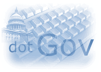 .gov registry logo